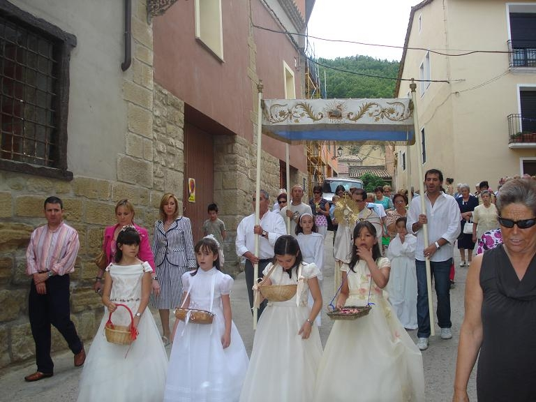 Procesión del Corpus Christi en Ayerbe. La custodia es la protagonista del cortejo, porque la procesión se organiza en virtudo a lo que ella representa. El palio se emplea en las procesiones para resguardar al sacerdote que lleva el Santísimo Sacramento. Este en particular, fue un regalo de Rafael Otal, que fue alcalde de Ayerbe en la década de 1950. Está bordado con hilo de oro y lleva imitación de perlas y pedrería. Lleva 6 varas pero se decidió ponerle solamente cuatro, por falta de medios personales.